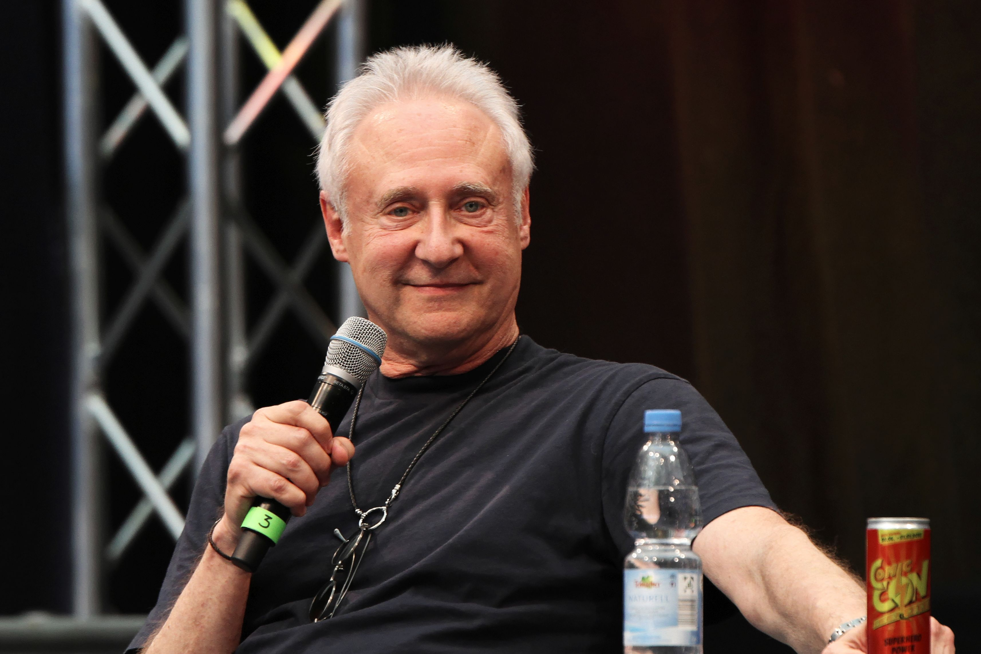 Bilder von der Comic Con Germany 2019 in Stuttgart